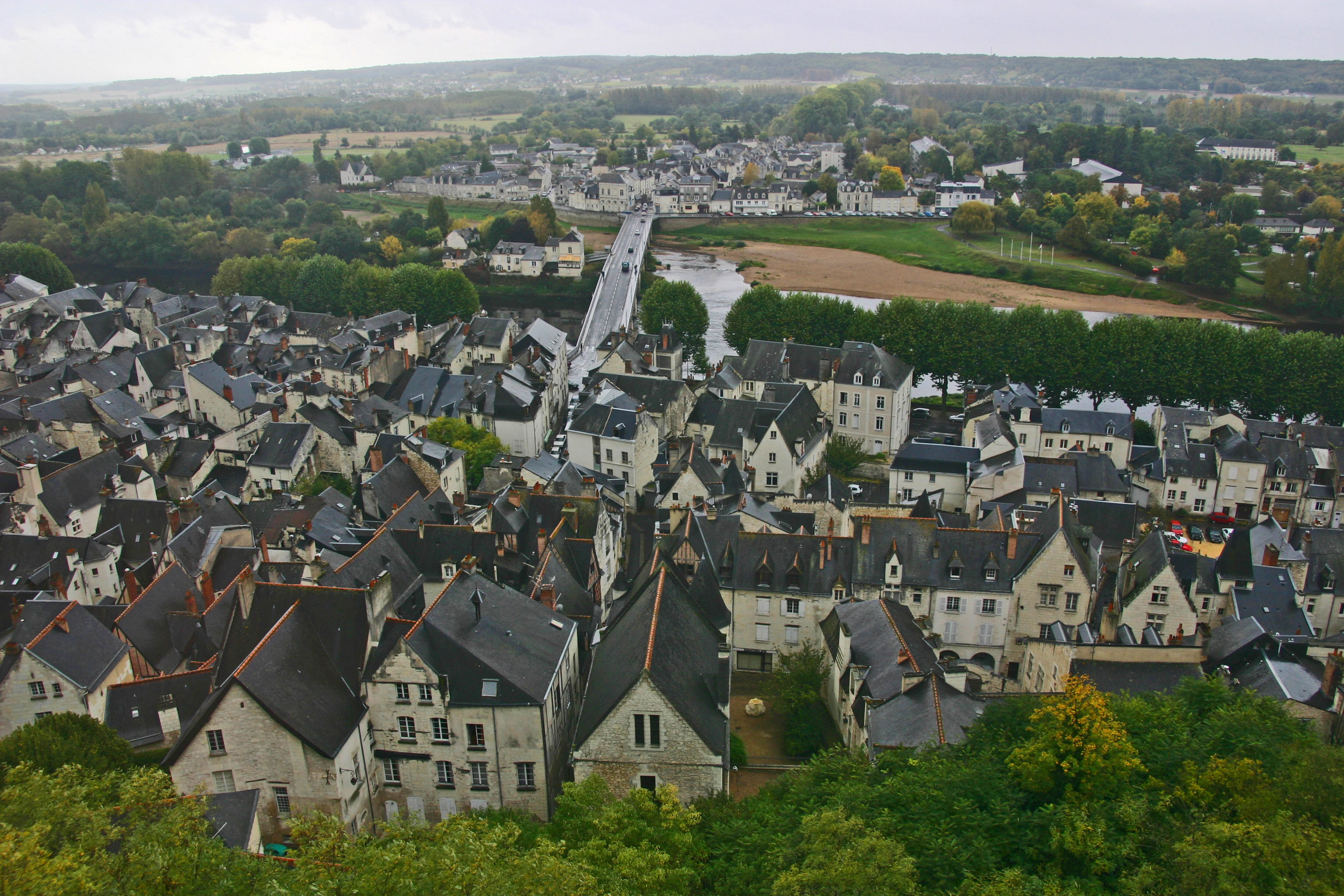 Chinon